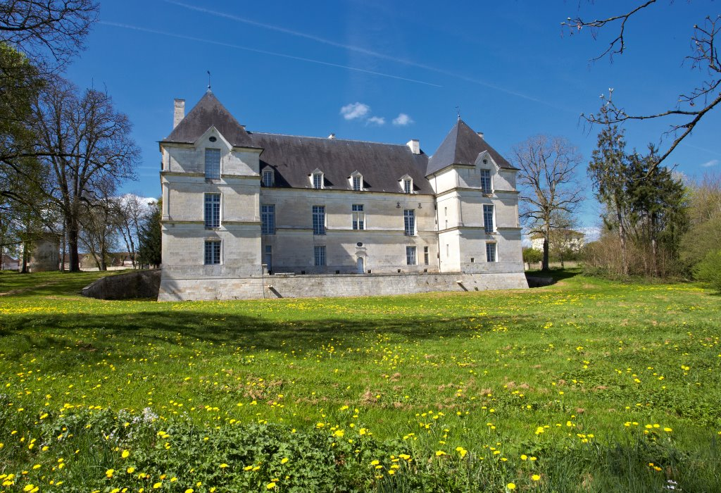 Château de Nuits, façade orientale